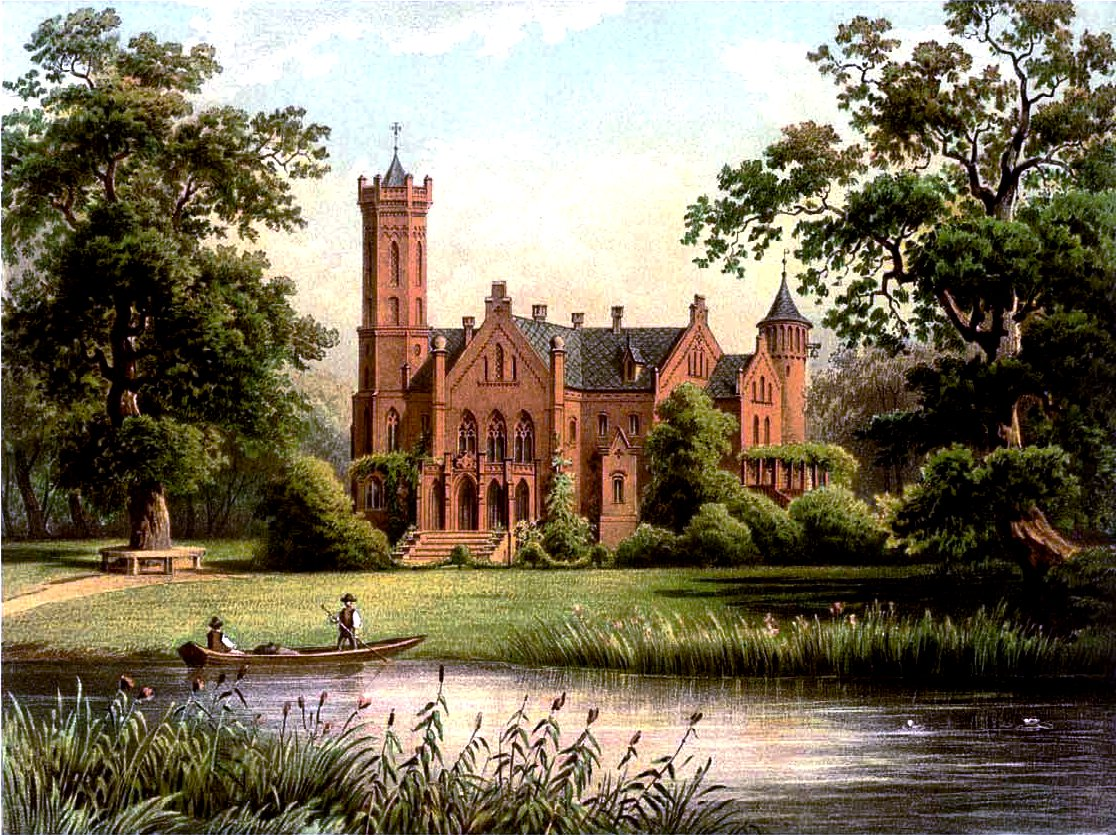 Schloss Seedorf, Lithografie aus dem 19. Jahrhundert